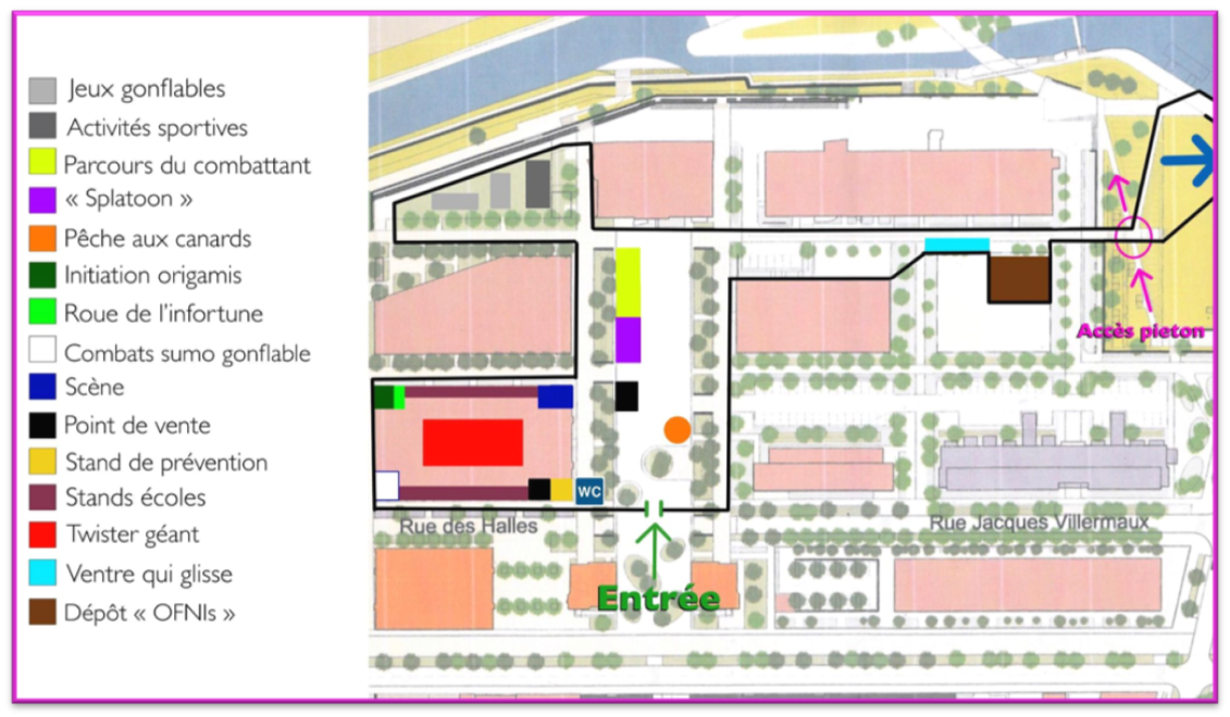 Plan Aquacité 2019